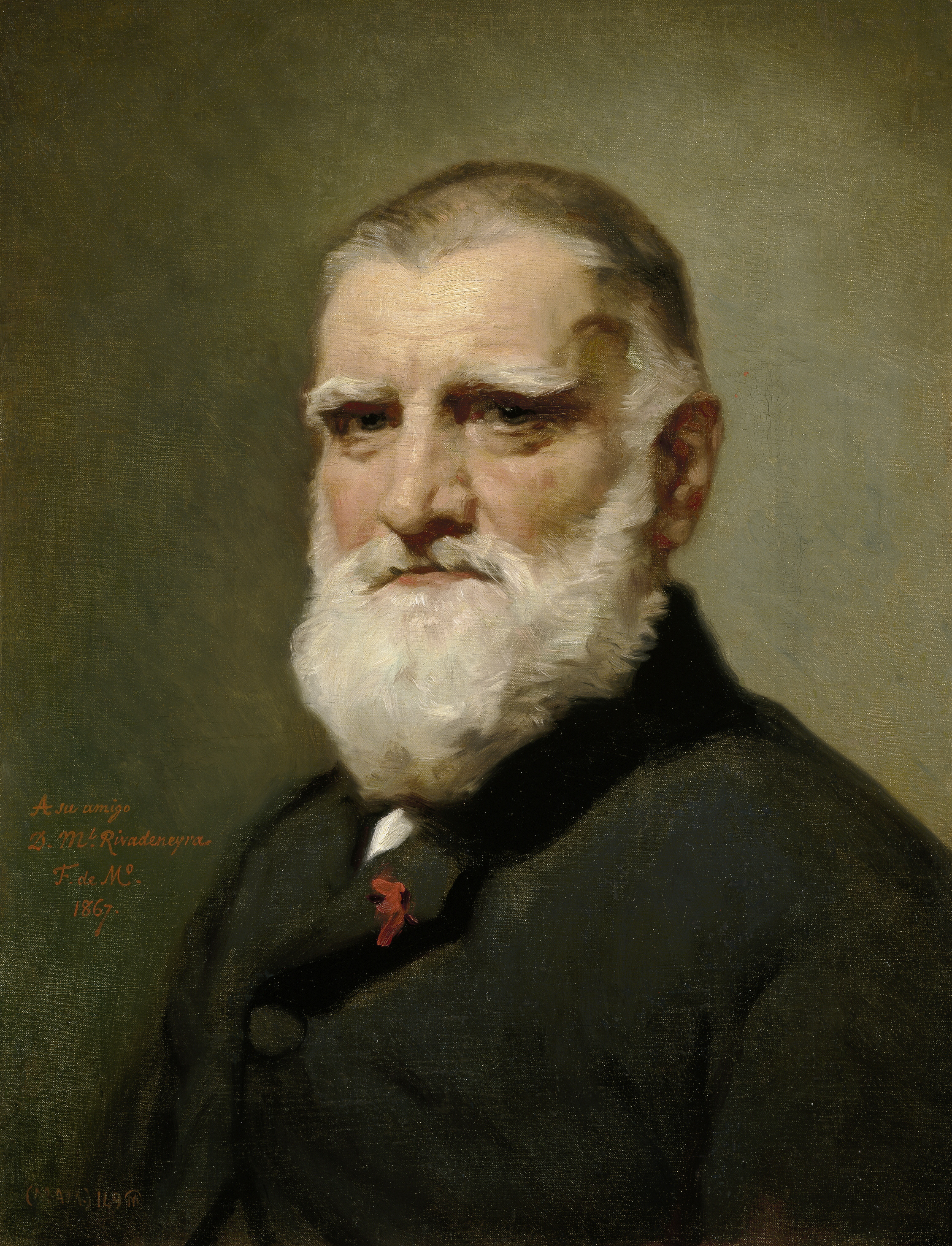 Retrato del editor e impresor español Manuel Rivadeneyra (1805-1872).